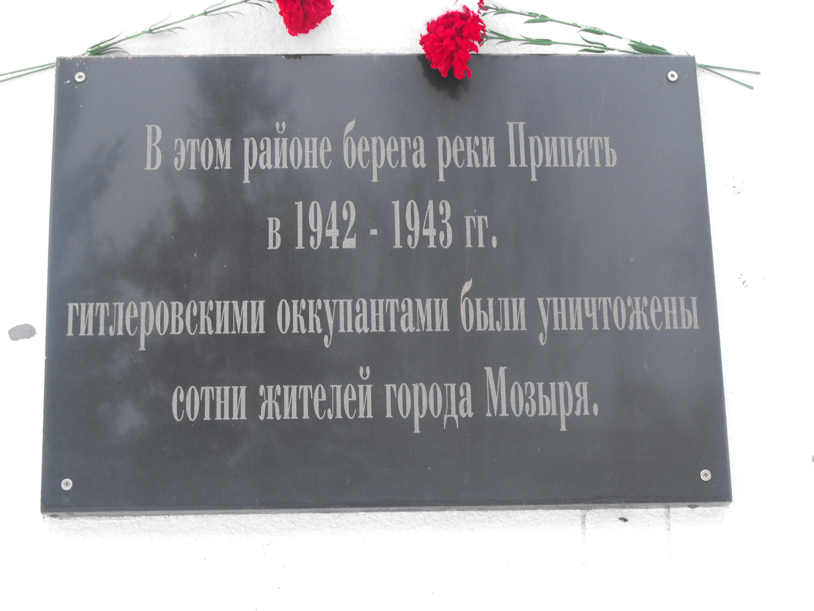 Мемориальная табличка (без упоминания национальности жертв) на стене здания Белорусского речного пароходства на берегу Припяти, где гитлеровцы неоднократно массово топили евреев.